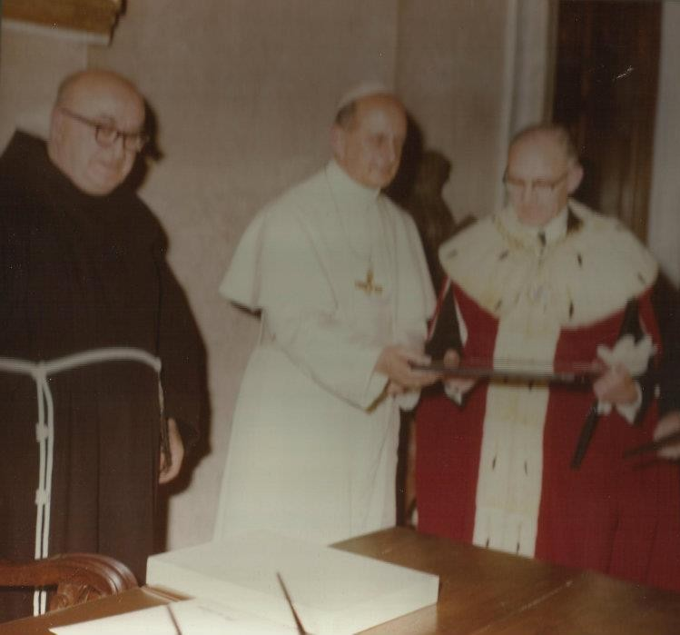 Balic e Paolo VI